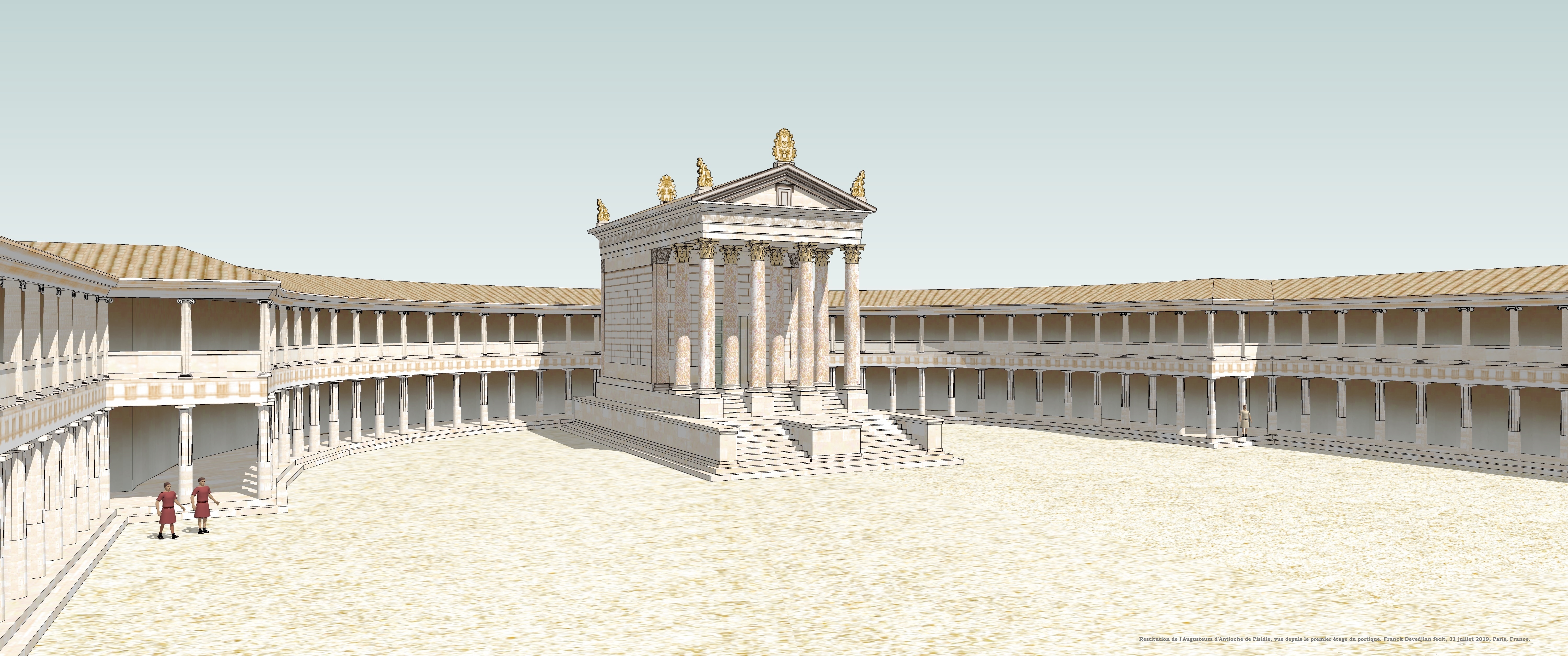 Restitution de l'Augusteum, vue depuis le premier étage.